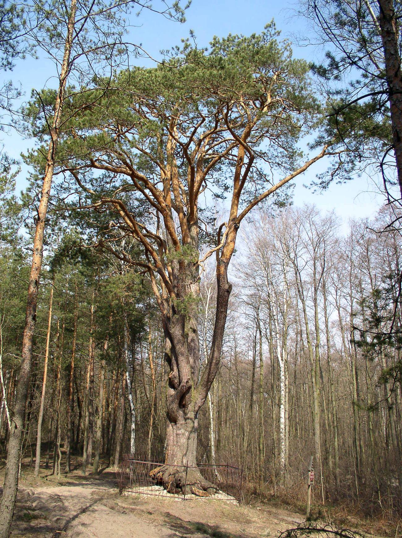 Pinus silvestris na trasie Mińsk Mazowiecki - Gliniak, 2 kwietnia 2005. Obwód w pierśnicy 3,6m, wysokość 22m. Pomnik przyrody.